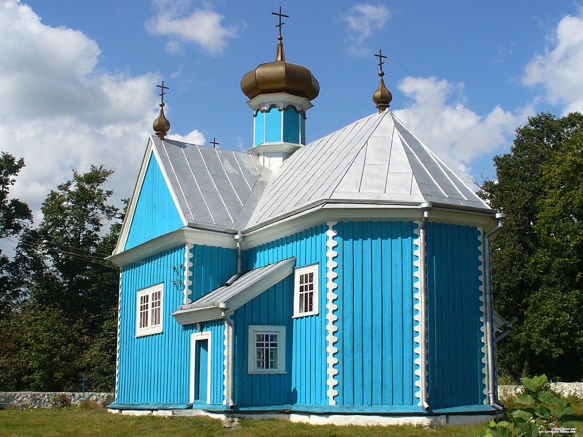 Покры. Свята-Пакроўская царква